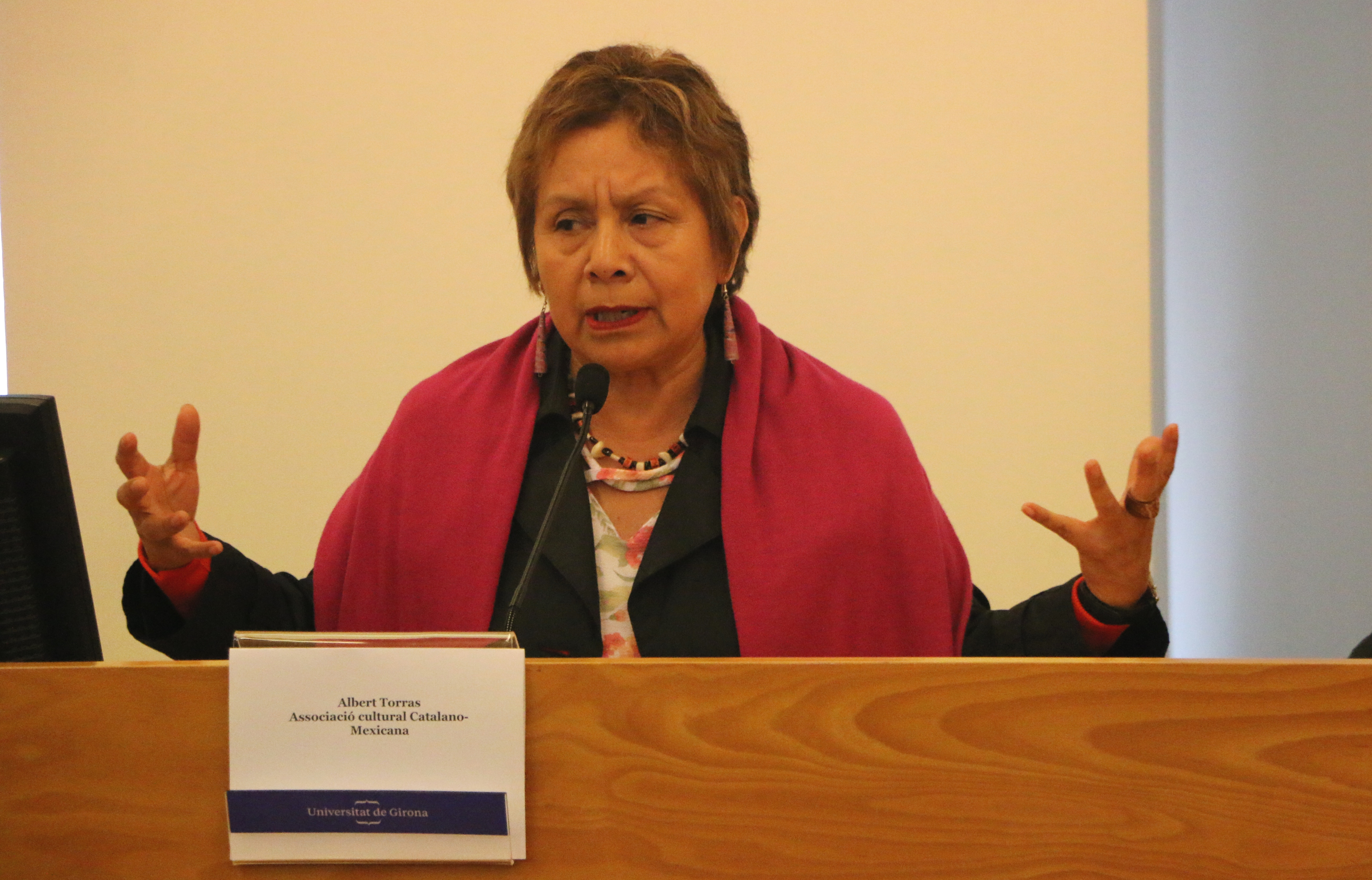 Setmana de Mèxic